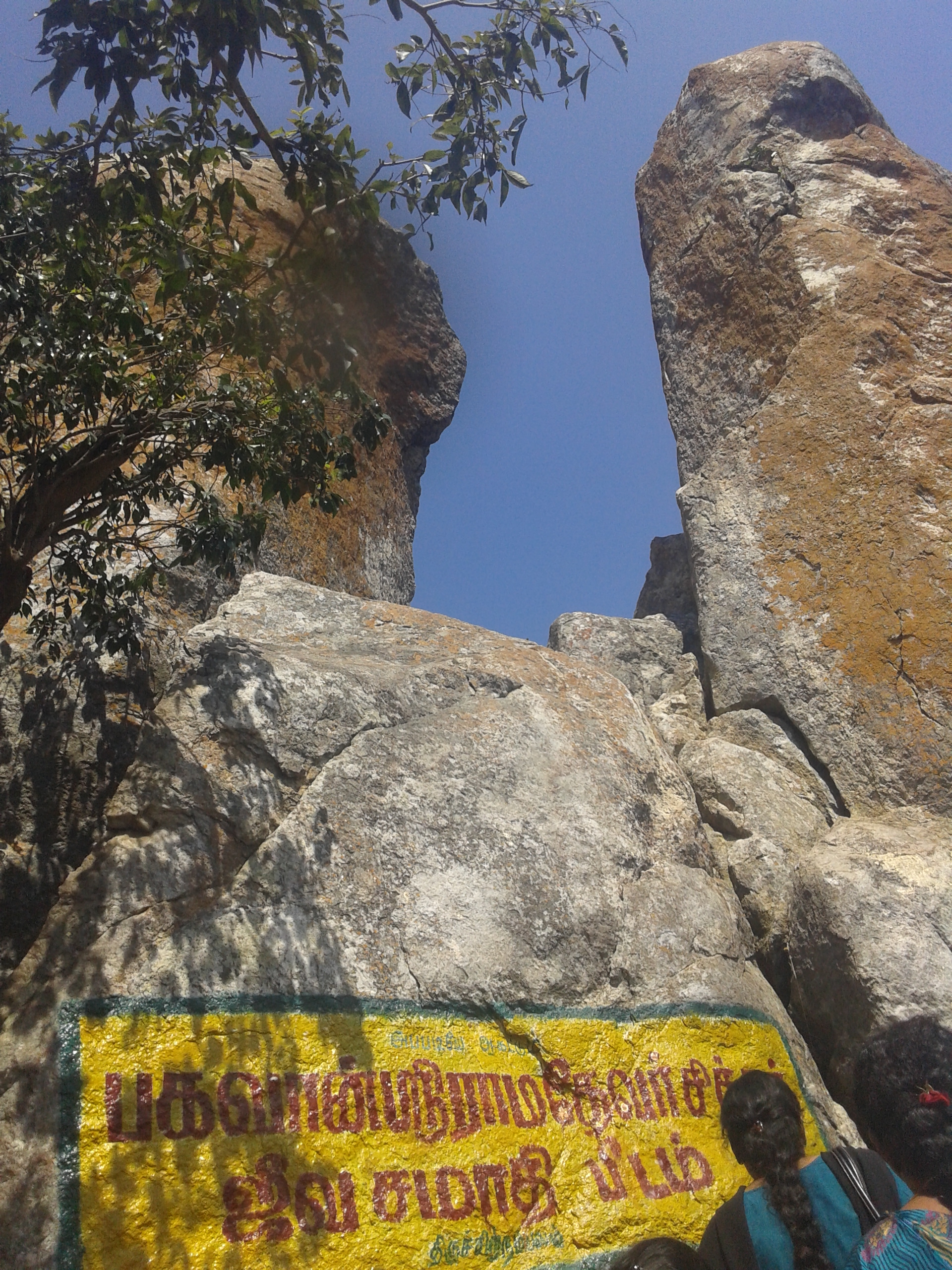 பகவான் ராம தேவர் சித்தர்